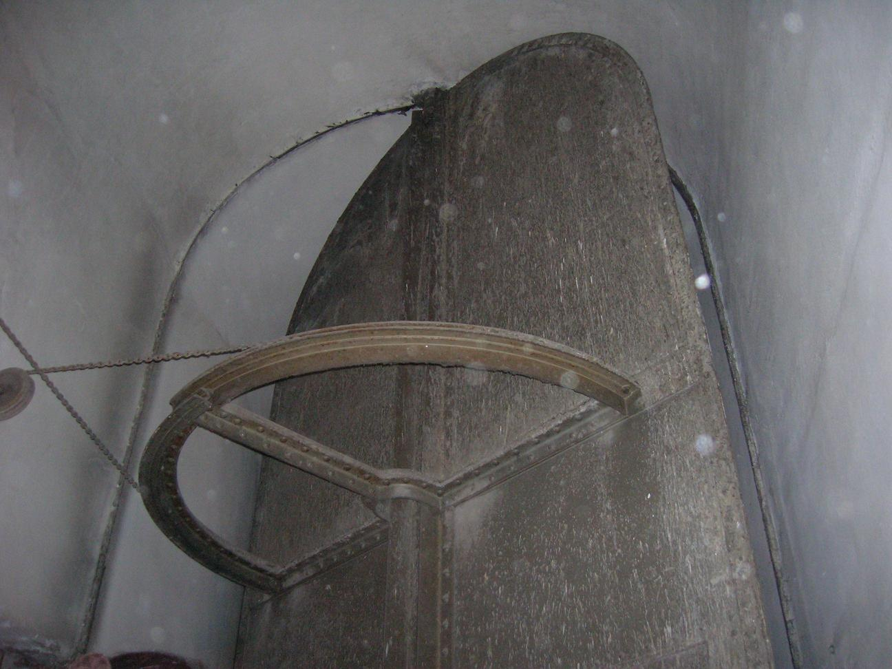 Vienna, Burgtheater, Belüftungsanlage, zugemacht